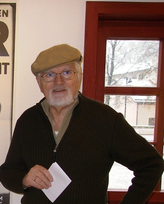 Der Grafiker Karl-Heinz Drescher (1936-2011) vor einem seiner bekanntesten Plakate. Galerie im Bürgerhaus Zella-Mehlis, 2008. Karl-Heinz Drescher war 37 Jahre lang der Hausgrafiker des Berliner Ensembles.